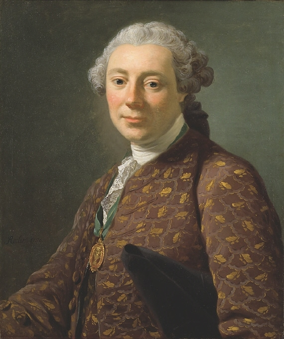 Jean Eric Rehn (1717-1793), avporträtterad 1756 av Alexander Roslin. Rehn bär brunfärgad dräkt, under vänster arm en svart trekornshatt. Runt halsen syns Vasaorden i sitt gröna band.